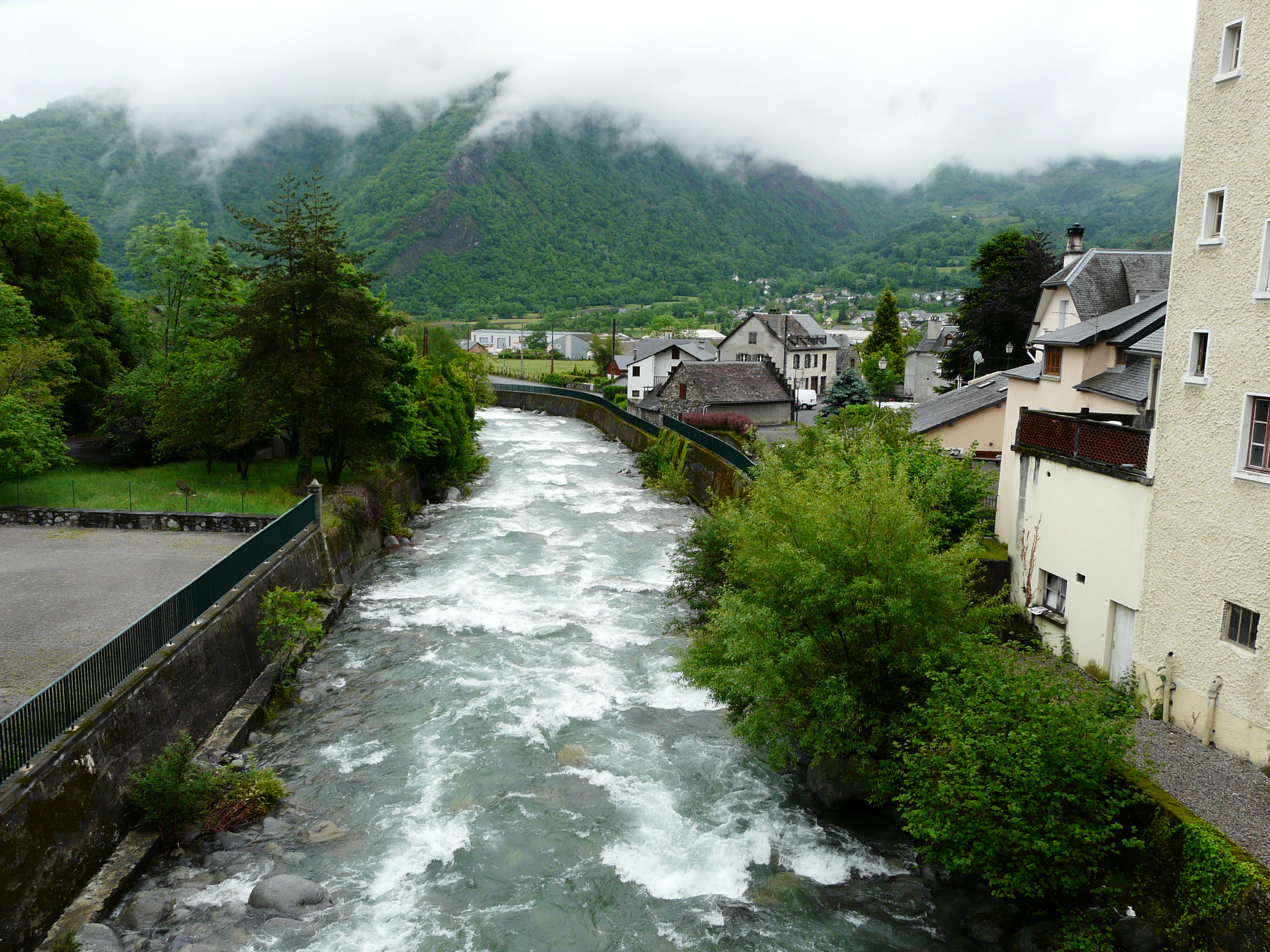 Le gave de Cauterets en aval du pont de la route départementale 921, Soulom, Hautes-Pyrénées, France.